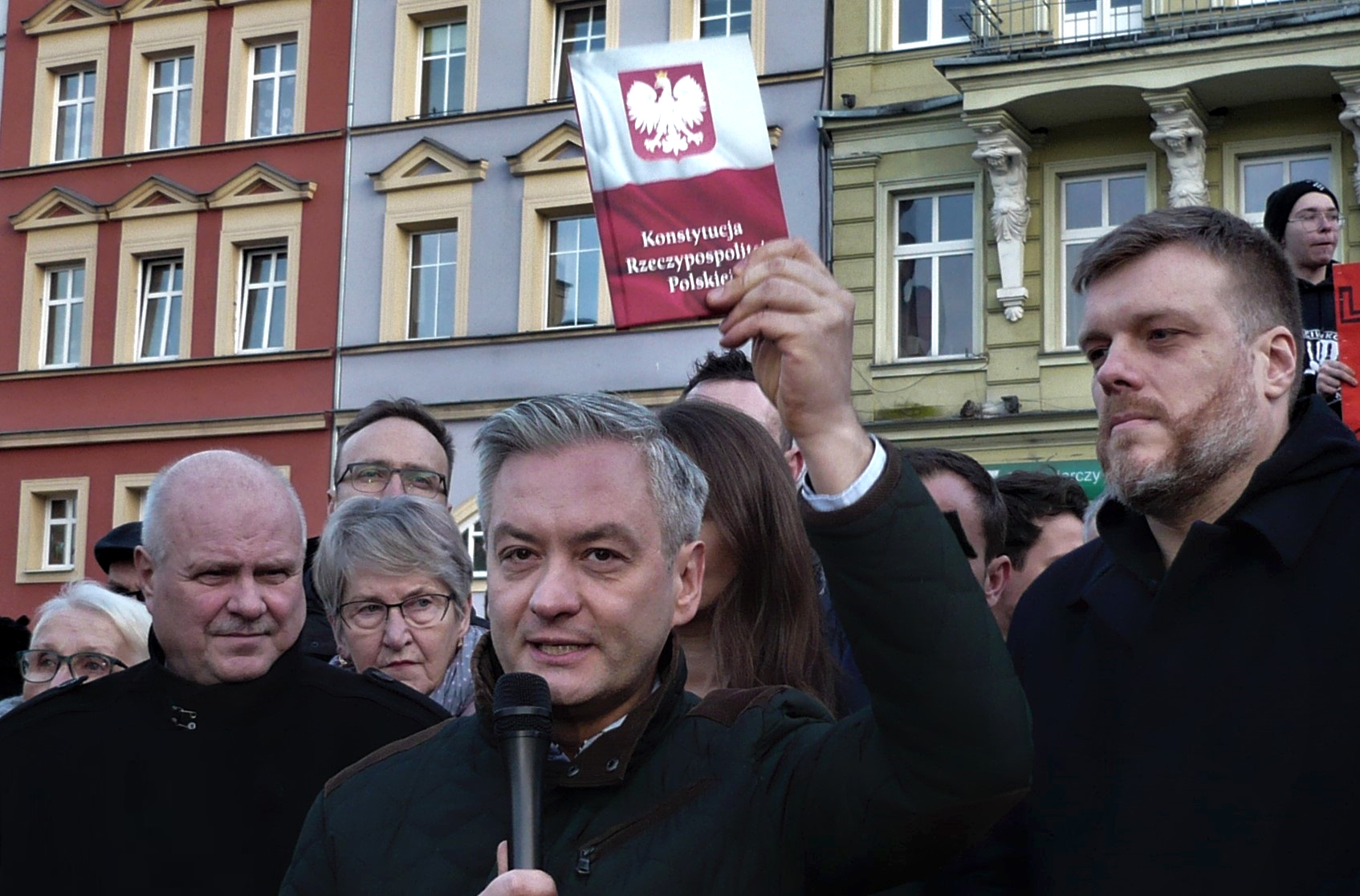 Protest przeciwko likwidacji oddziału wewnętrznego szpitala w Nowej Rudzie z udziałem: Roberta Biedronia, Adriana Zandberga, Agnieszki Dziemianowicz-Bąk, Marka Dyducha. Rynek, Nowa Ruda, 09.02.2020 r.